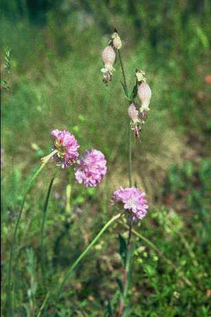 Galmei-Grasnelke(armeria maritima ssp. calaminaria)&Taubenkropf (silene vulgaris)